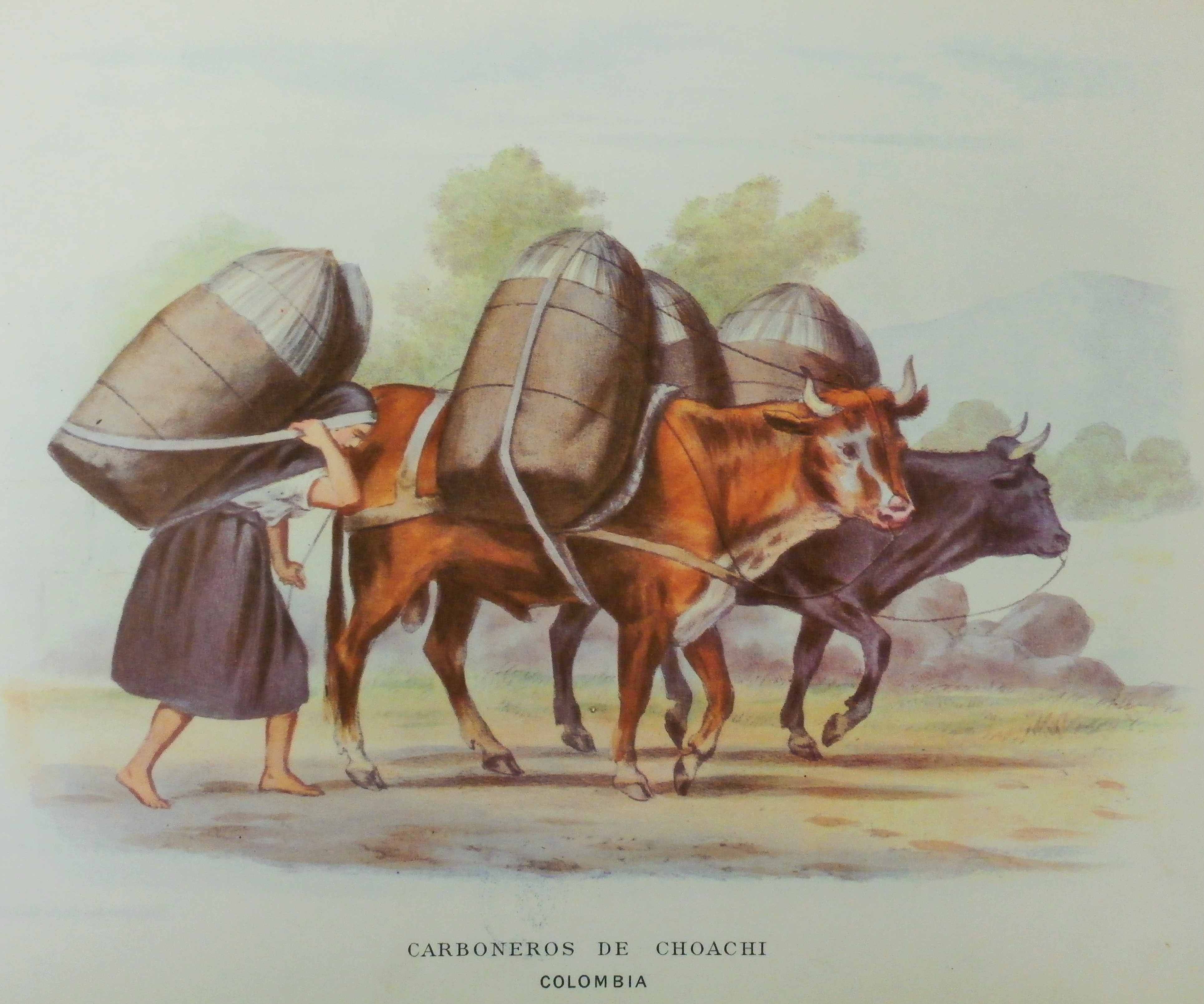 Litografía del artista colombiano Ramón Torres Méndez